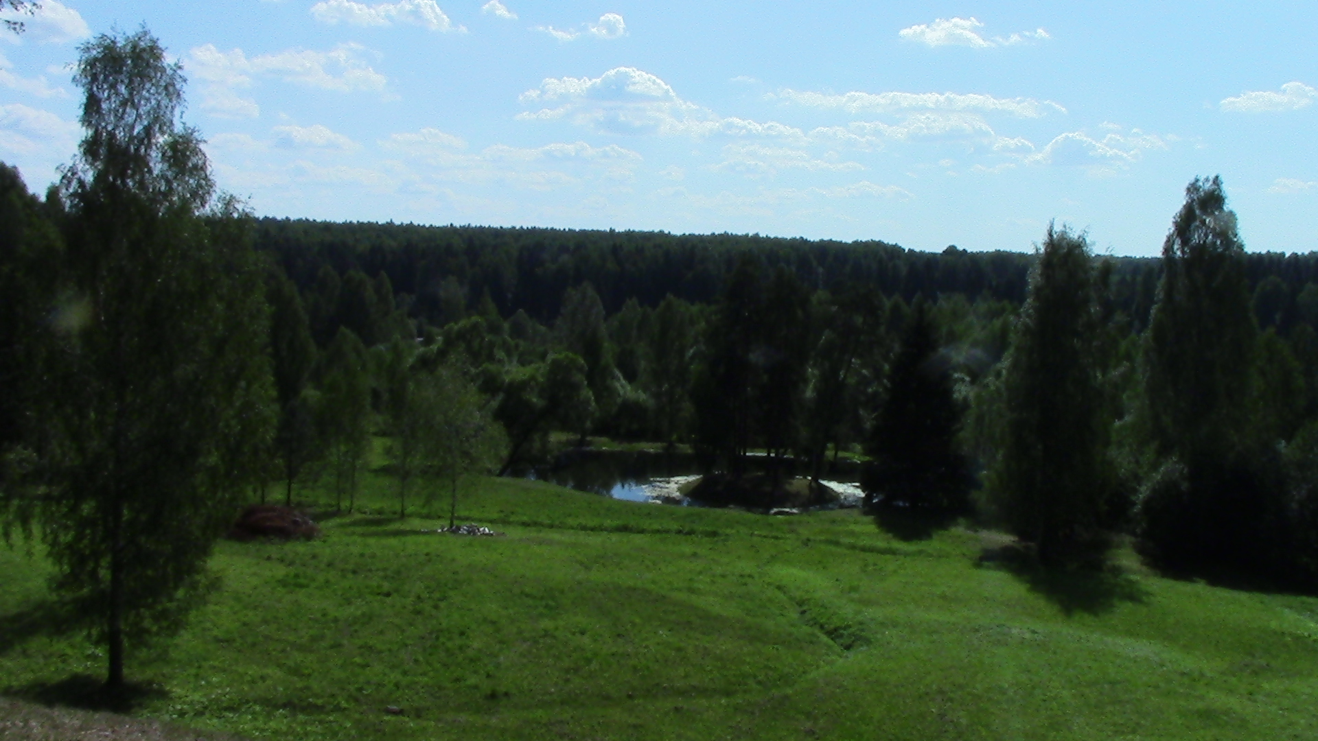 Парк усадьбы Щелыково у дома-музея А.Н.Островского, Островский район This image is related to the protected area of Russia number 4410548